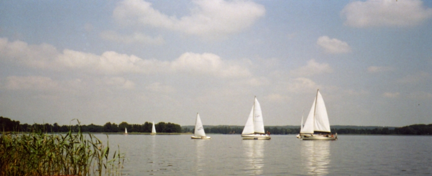 Narie Lake in Poland